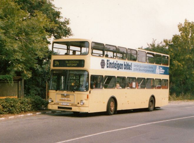 Einer der letzten SD200 SD85 Wg.3461